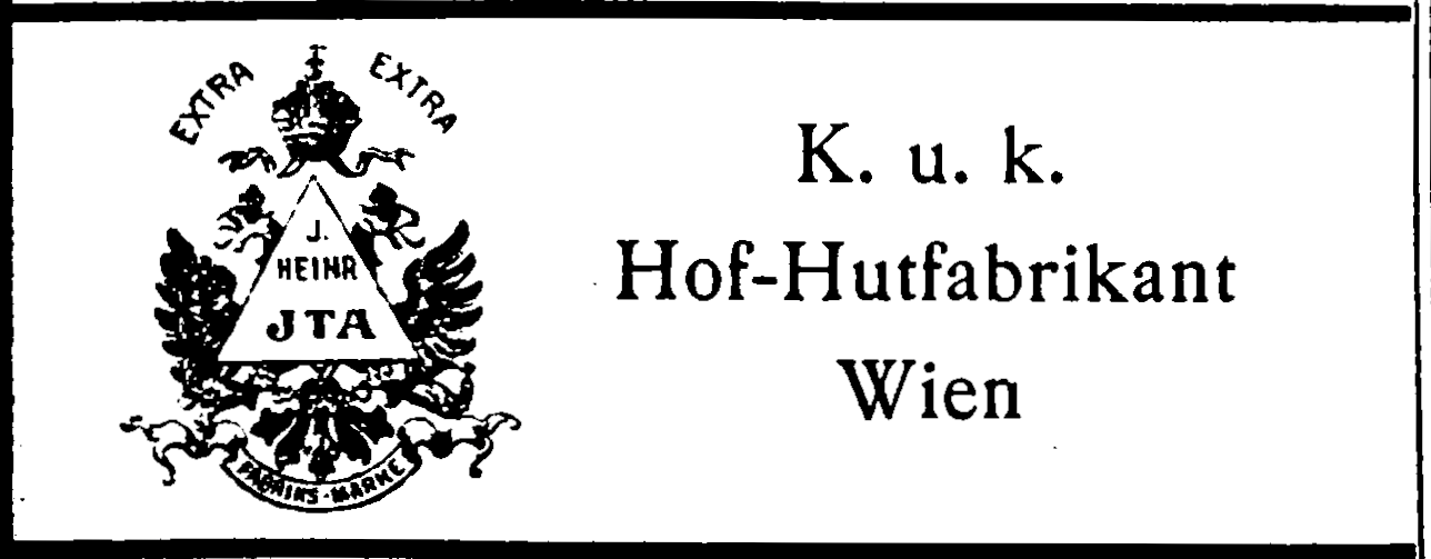 Werbung von Johann Heinrich Jta im Hof- und Staats-Handbuch der österreichisch-ungarischen Monarchie für das Jahr 1906.